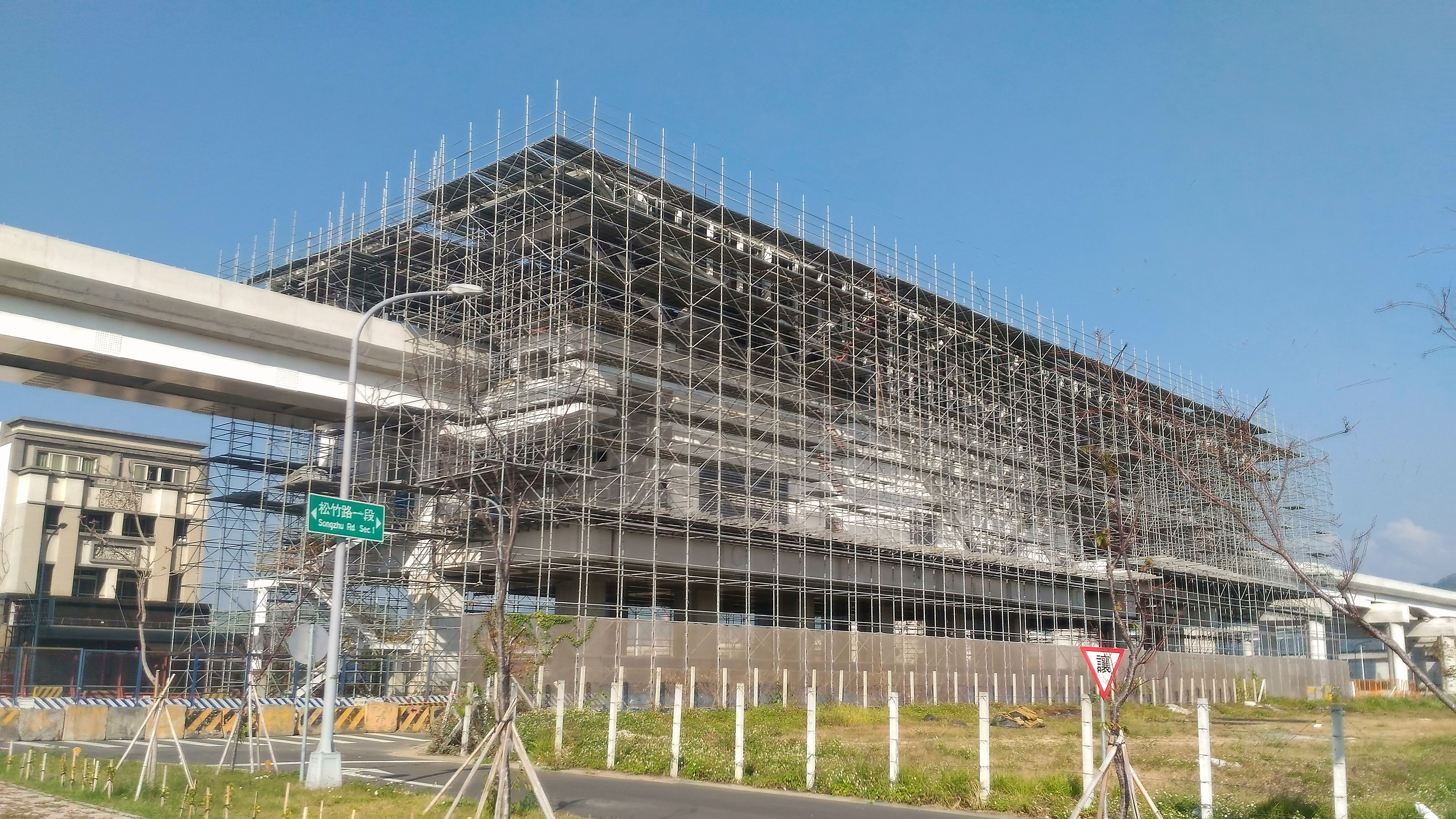 臺中捷運G3站2017年2月工程